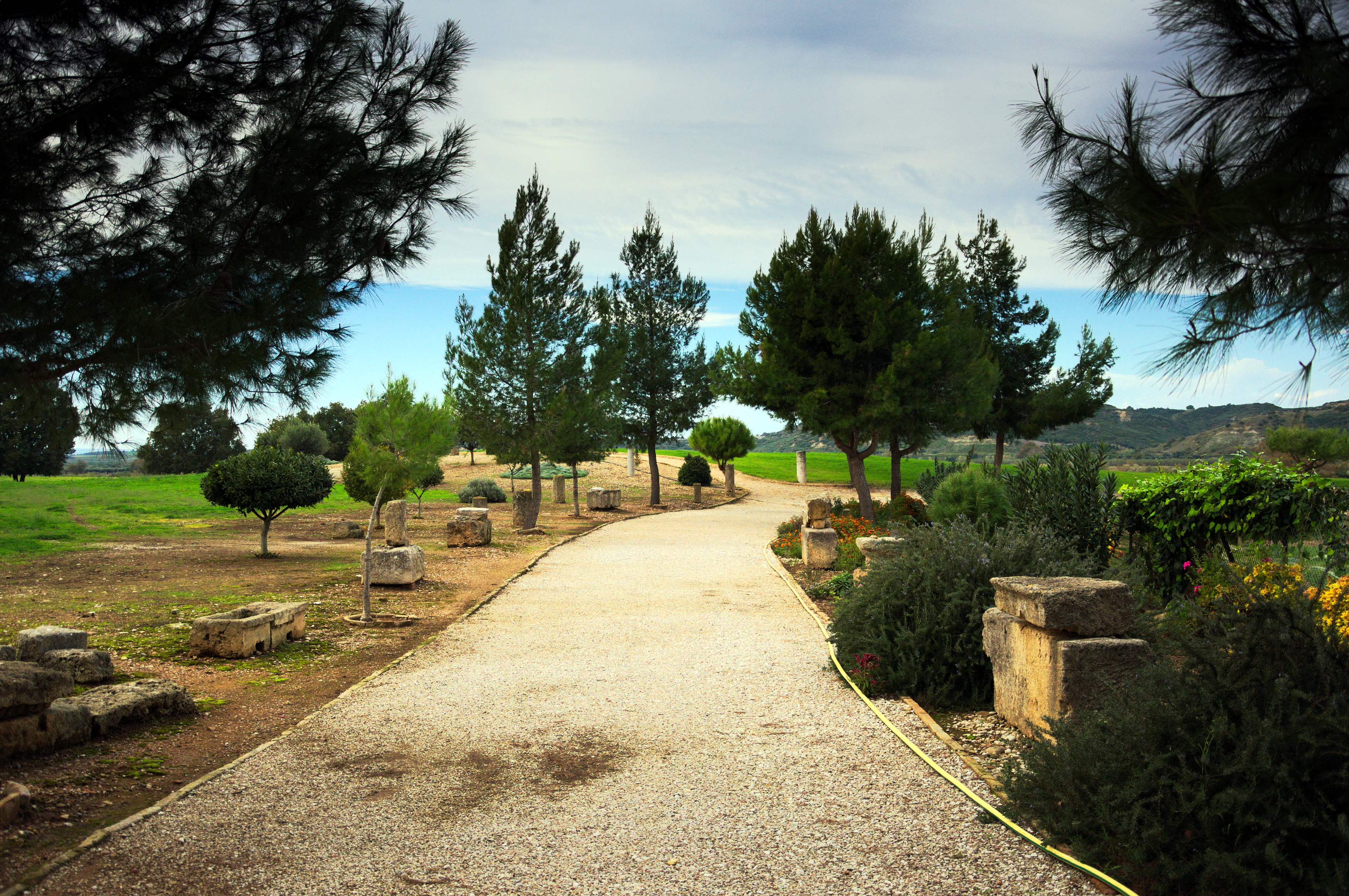 Αγορά αρχαίας Ήλιδος«Αγορά αρχαίας Ήλιδος»